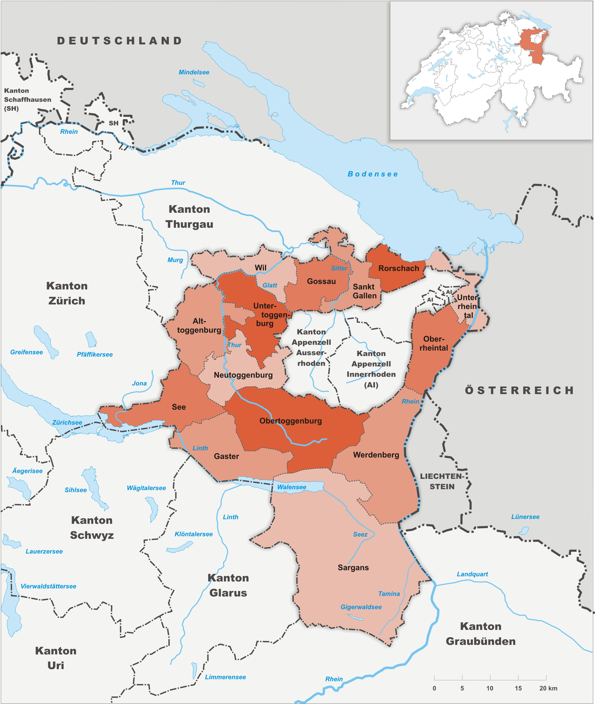 Bezirke des Kanton St. Gallen bis 2002